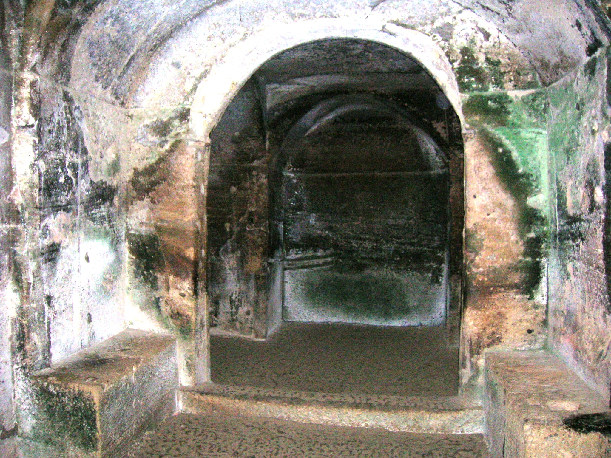 L'interno